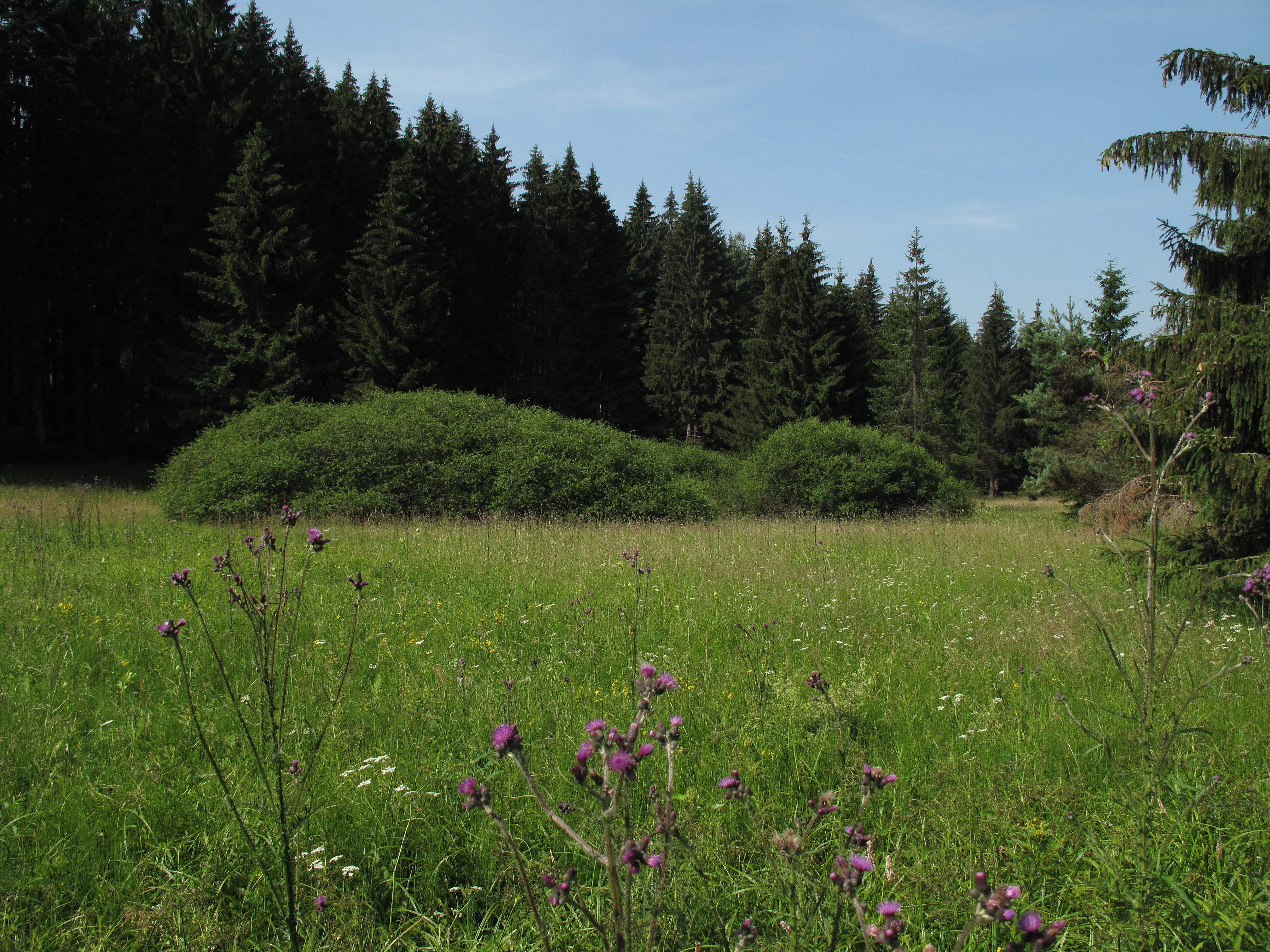 Přírodní památka Slavkovické louky. Okres Český Krumlov, Česká republika.